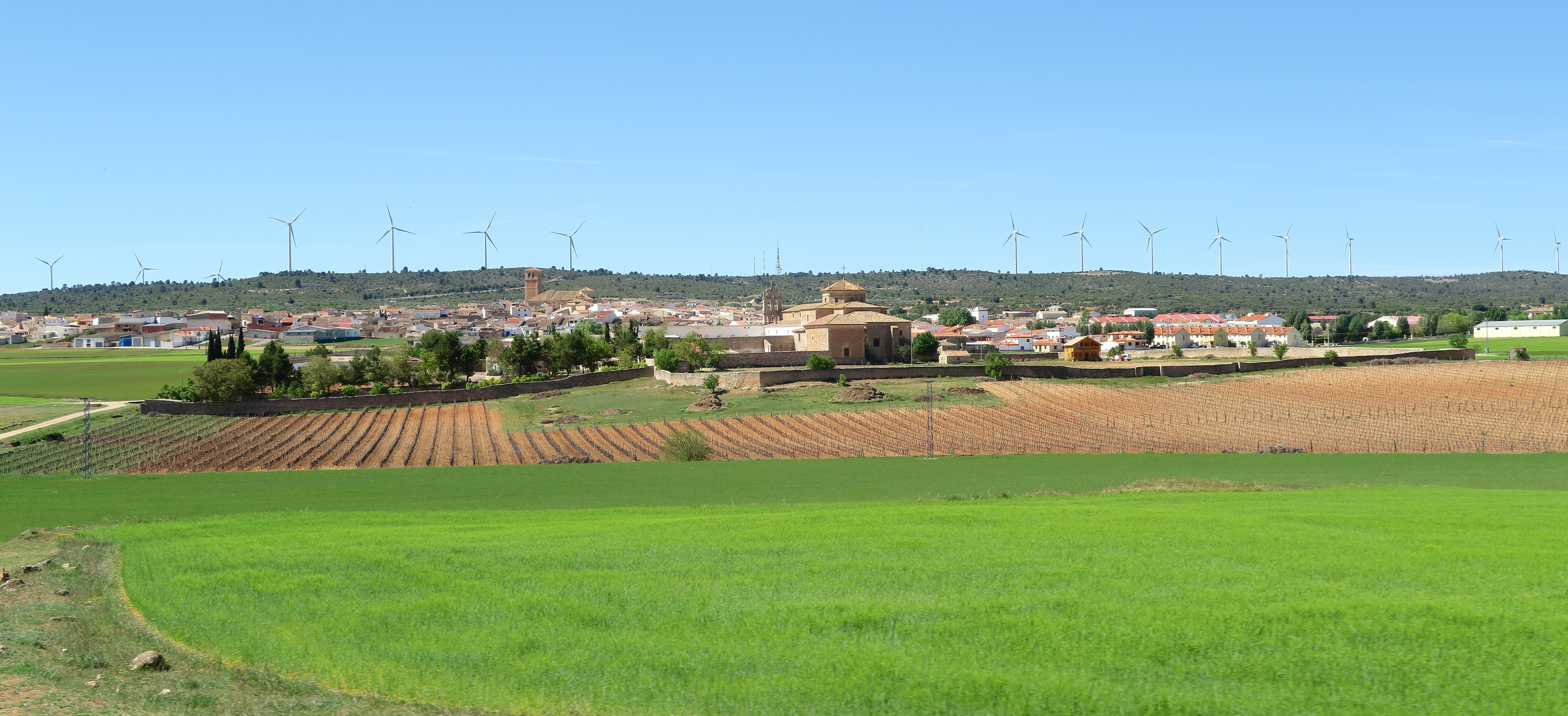 Campillo de Altobuey, desde CM-211